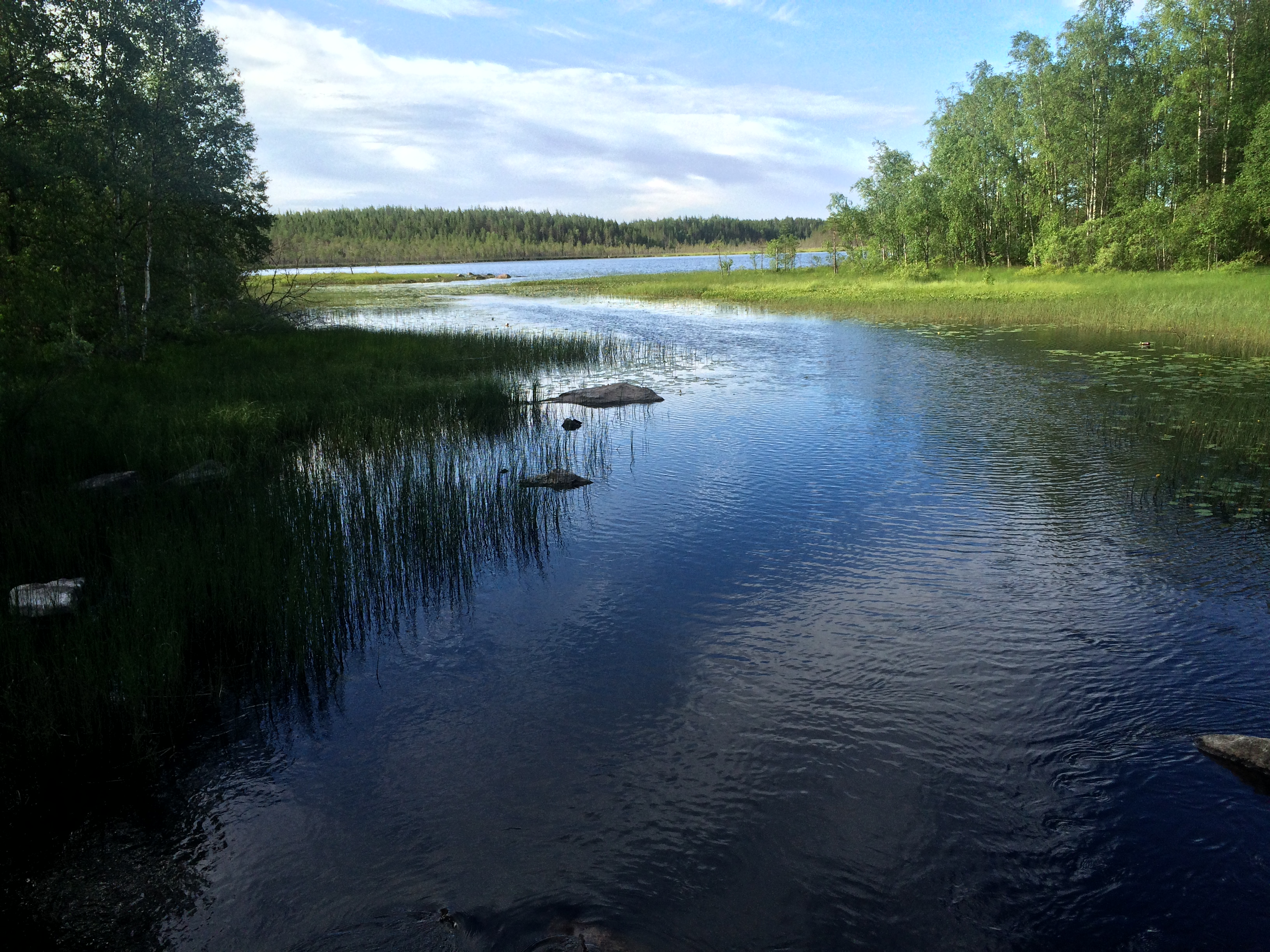 Поясйоки (приток Айттойоки)